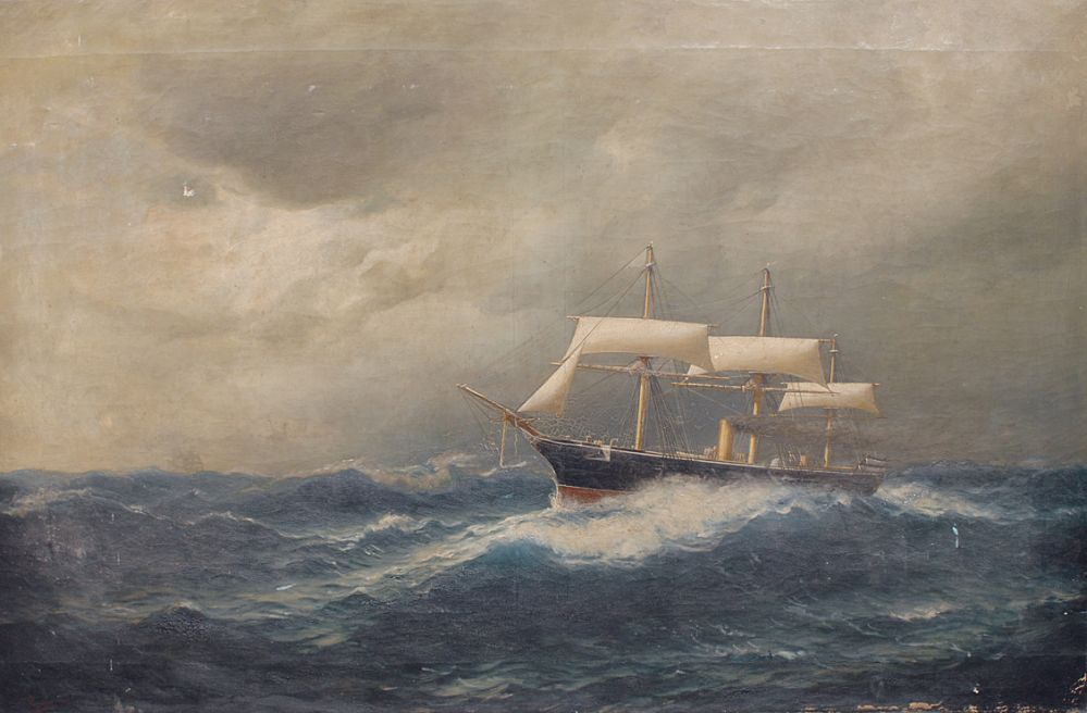 Die 'Bismarck' wurde 1875 bei der Norddeutsche Schiff AG in Gaarden gebaut, Stapellauf am 25. Juli 1877, Einsatz im Ostasiengeschwader